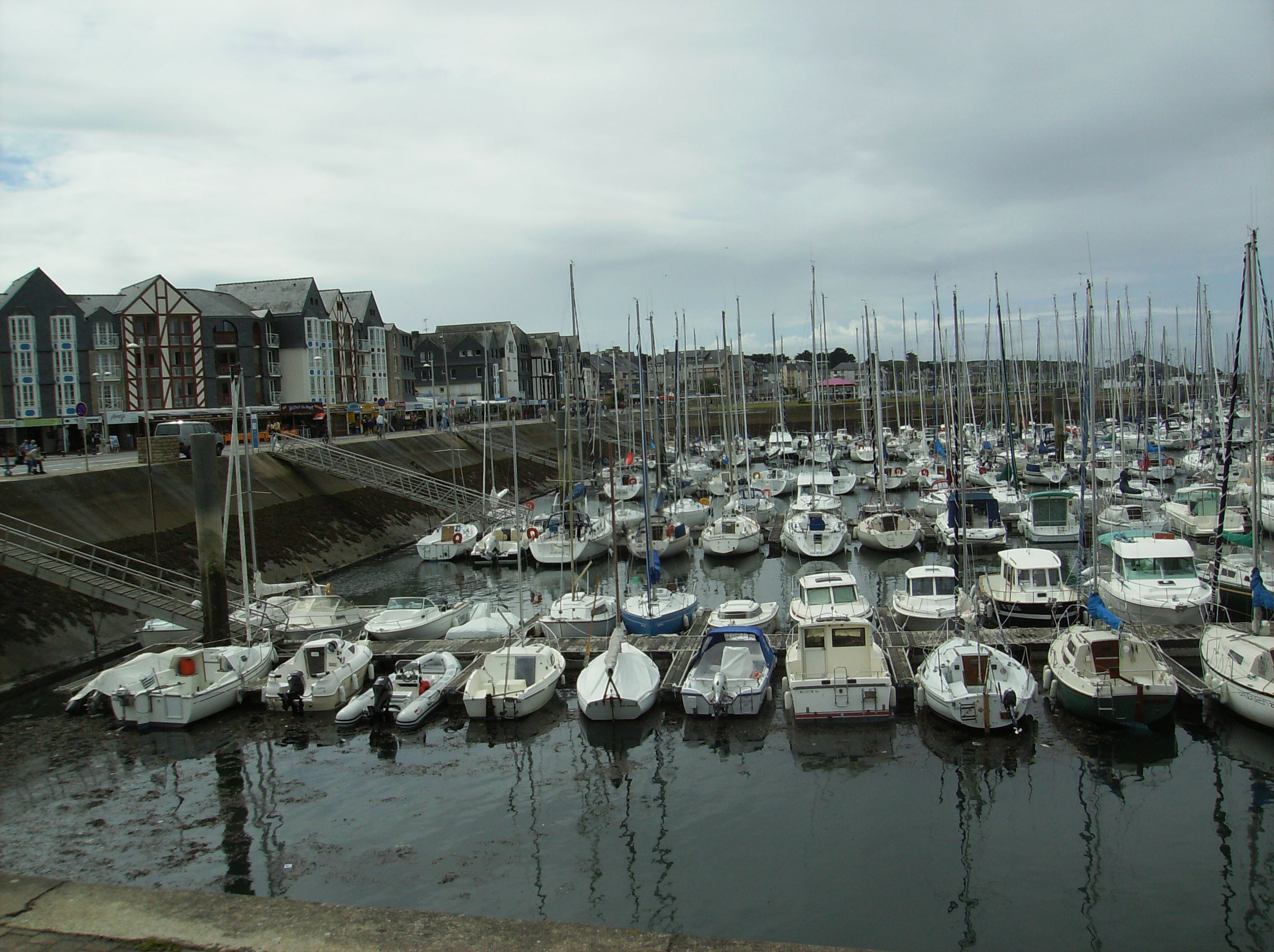 port de plaisance port crouesty bretagne france